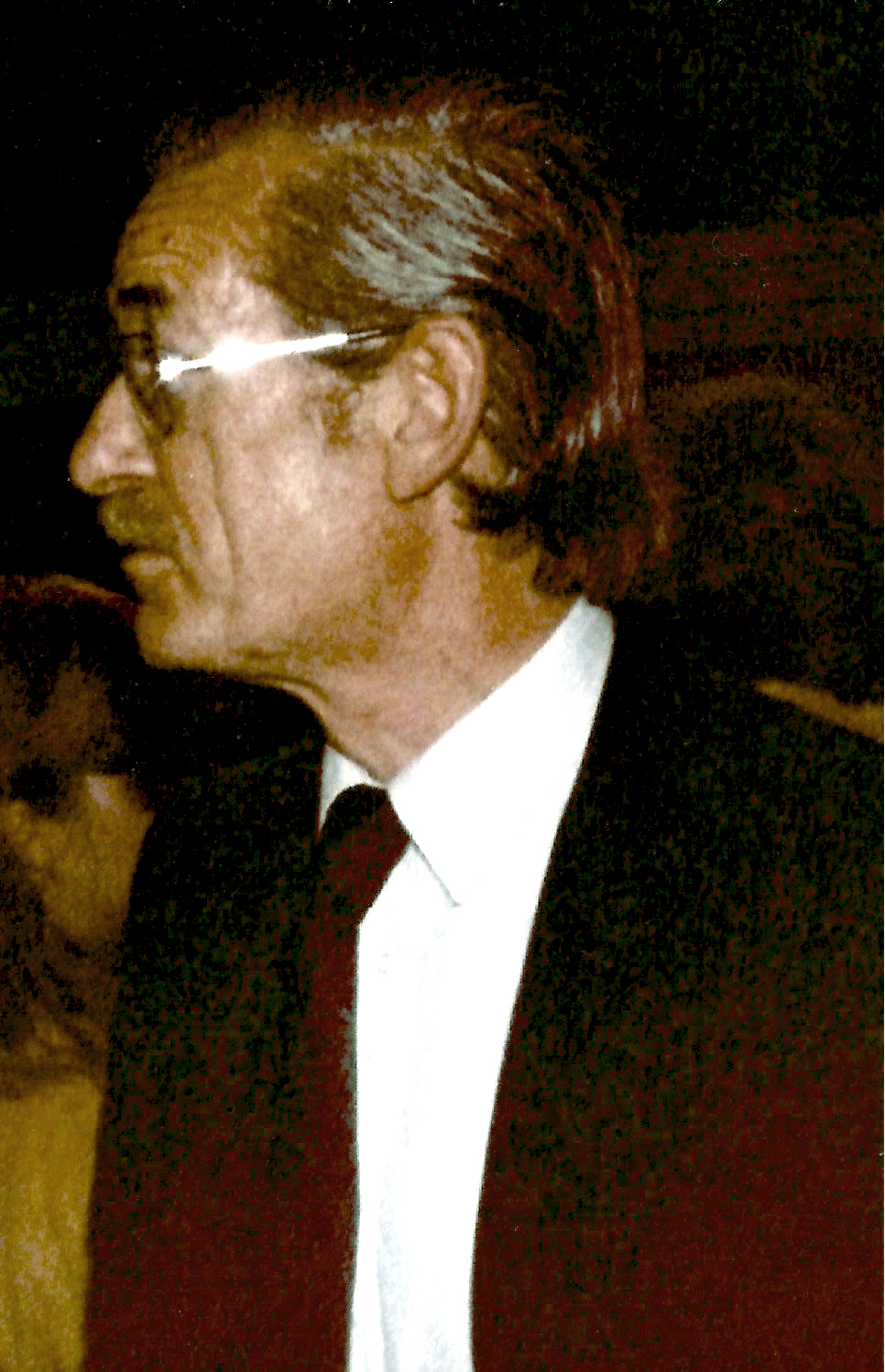 Bob De Moor. Gemaakt tijdens de stripdagen in Breda.